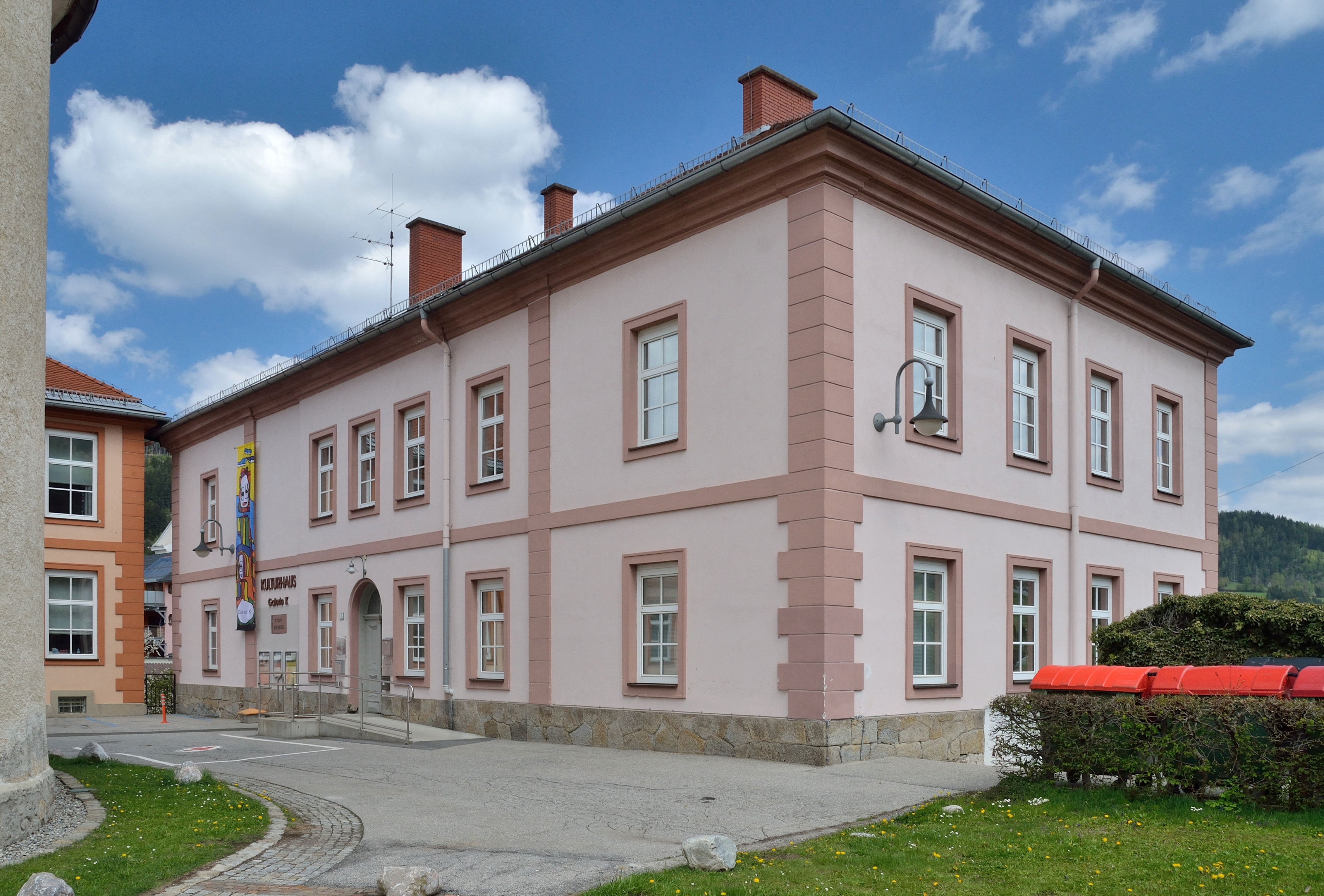 Kulturhaus Kindberg hinter der Kirche